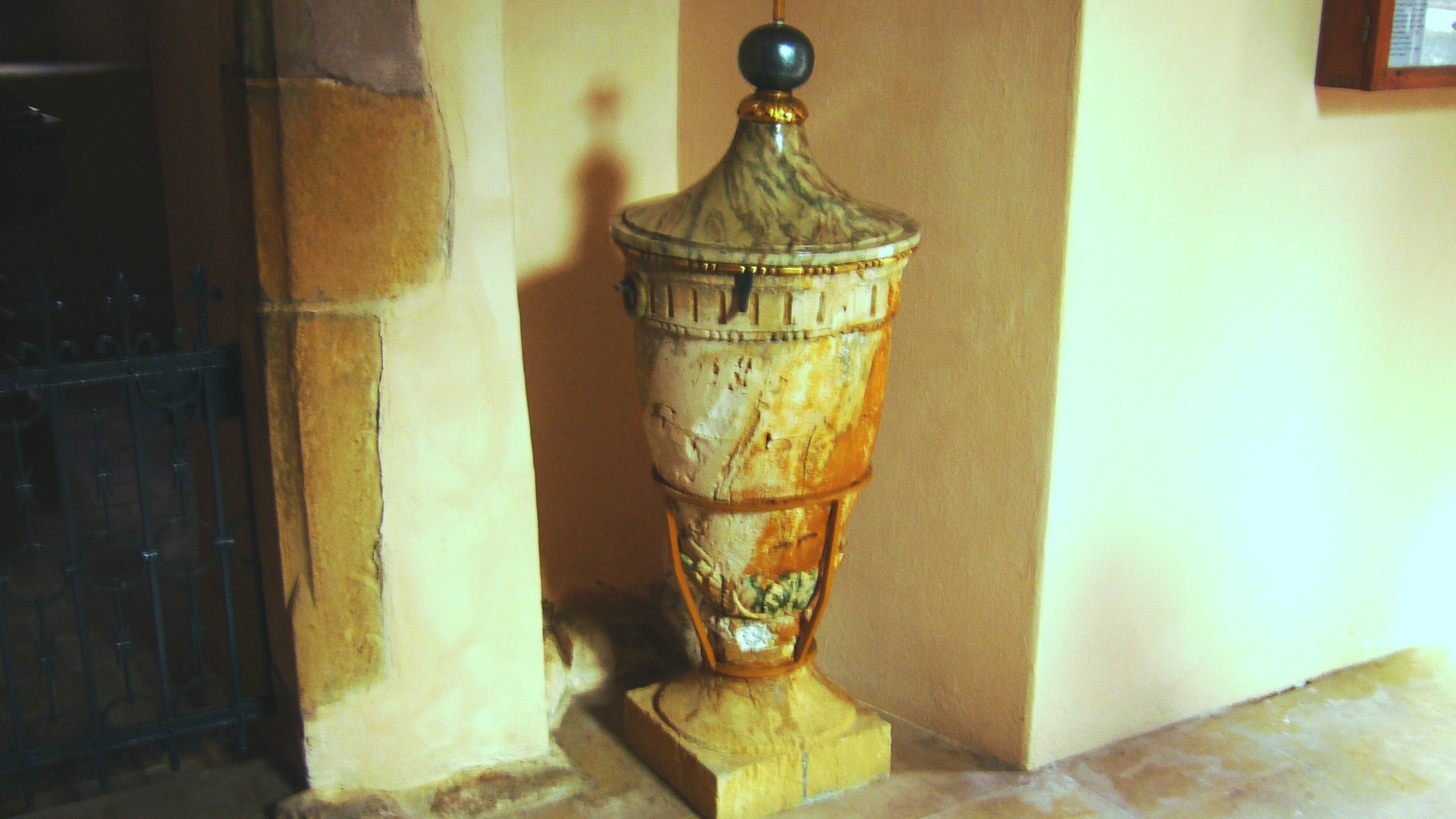 Ancien baptistère se trouvant à l'intérieur de l'église